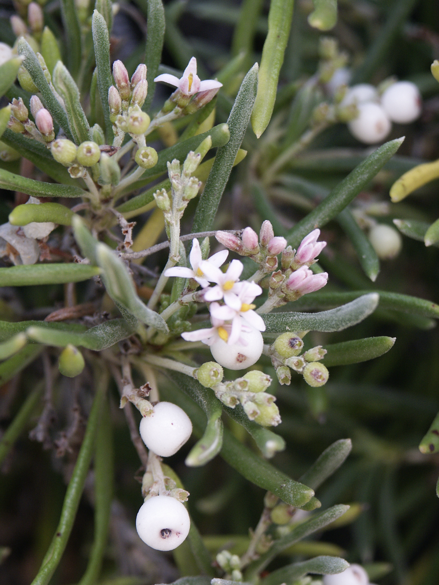 Barrera, Azua Prov., Dom. Rep.